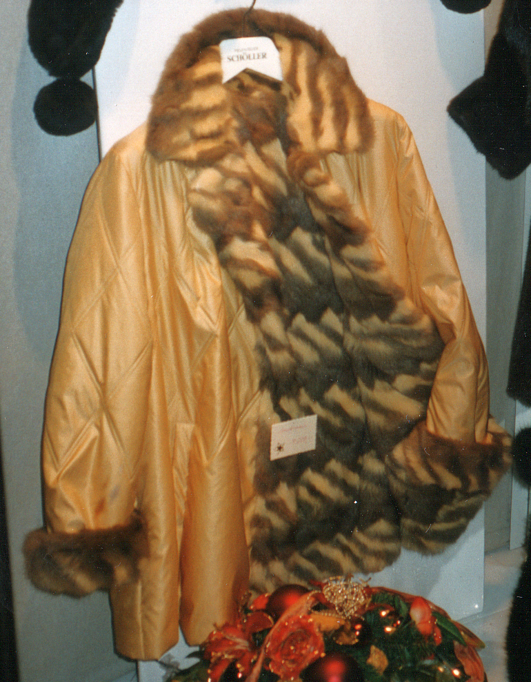 Pelzatelier Schöller, Gütersloh, Spiekergasse. Jacke mit Innenfutter aus gefärbter Fehwamme (Vintom).